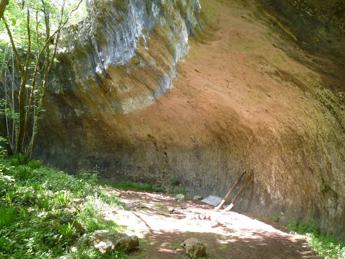 Abri sous falaise à Voulgézac (Charente, France)